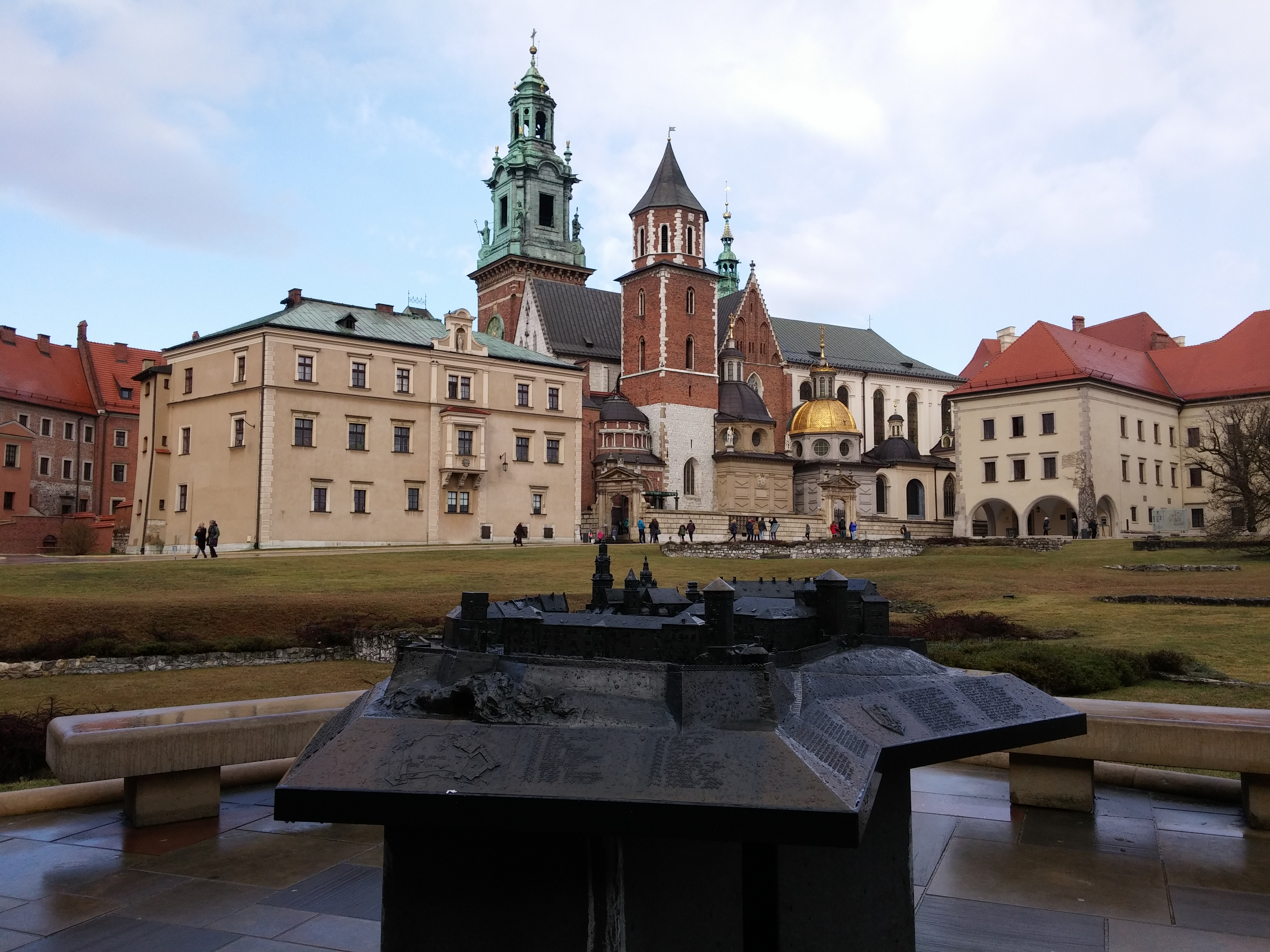 Makieta Wawelu oraz on sam w tle